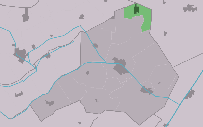 Kaartsje fan himrik fan Haulerwyk